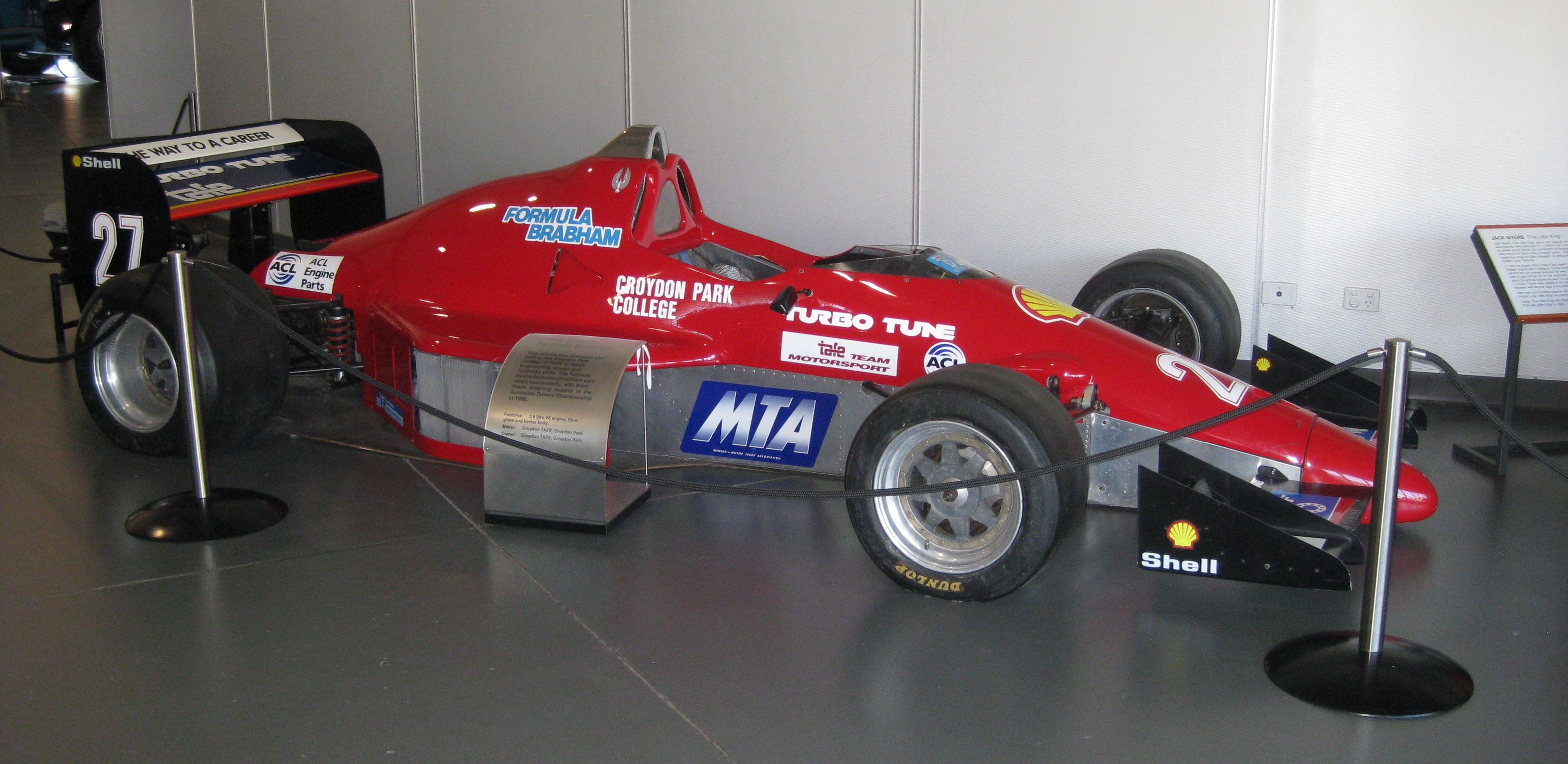 Shrike NB89H